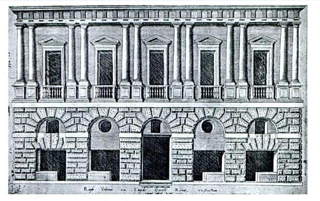 Palazzo caprini a Roma in un'incisione del XVI secolo